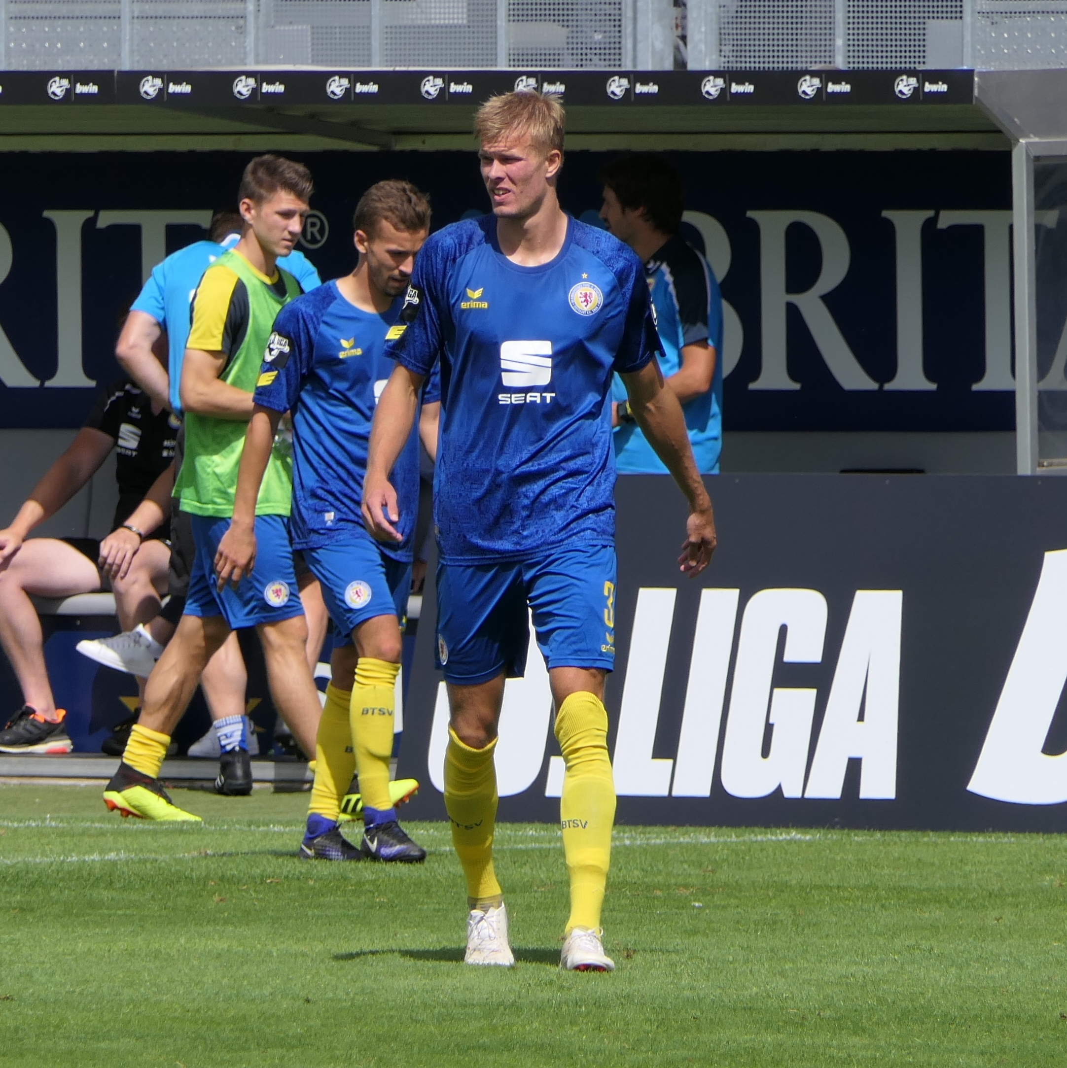 Der Fussballprofi Frederik Tingager im Trikot von Eintracht Braunschweig beim Auswärtsspiel beim SV Wehen Wiesbaden am 11.08.2018.